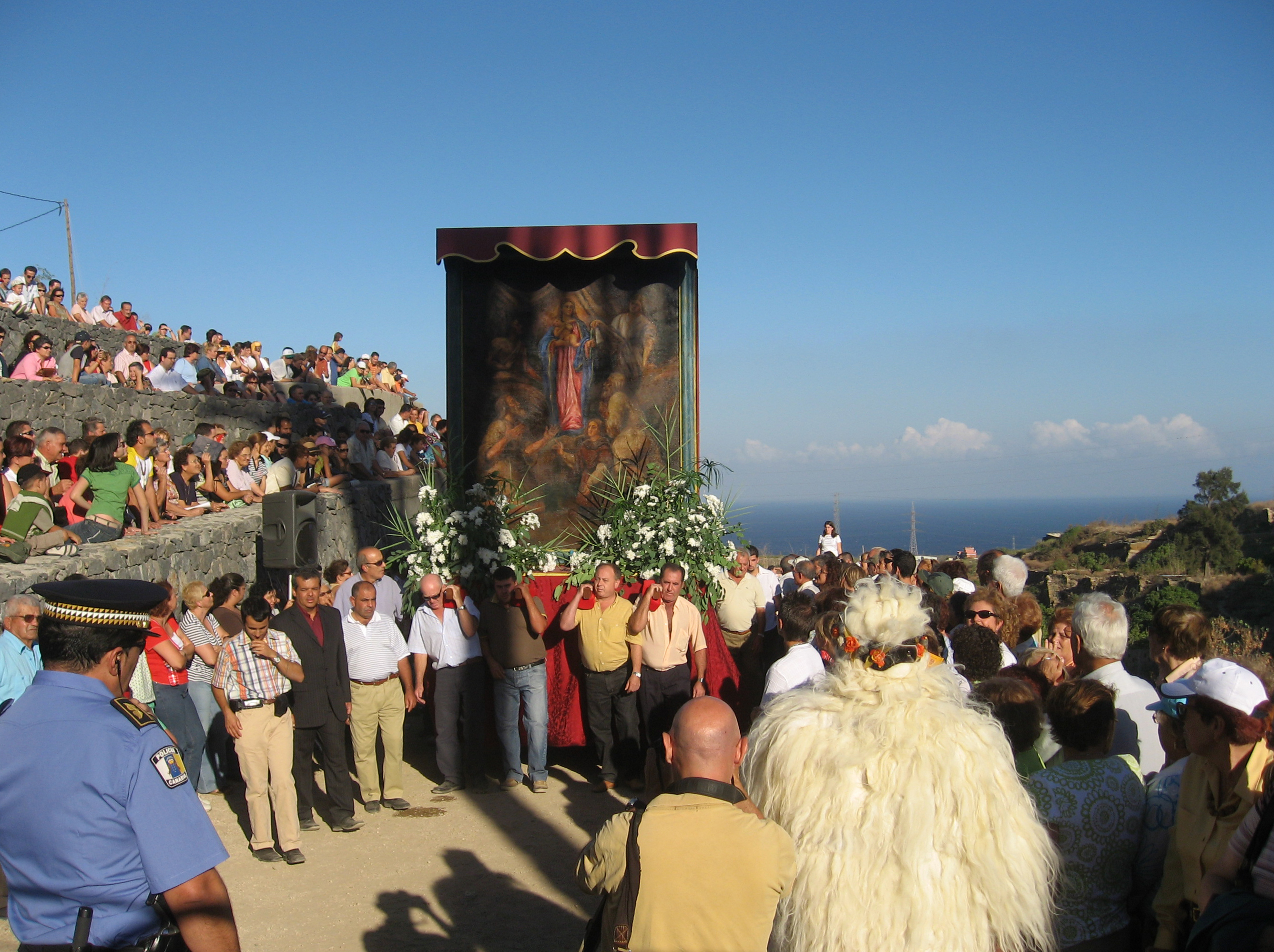 El cuadro de la Virgen de Chinguaro regresa a su capilla